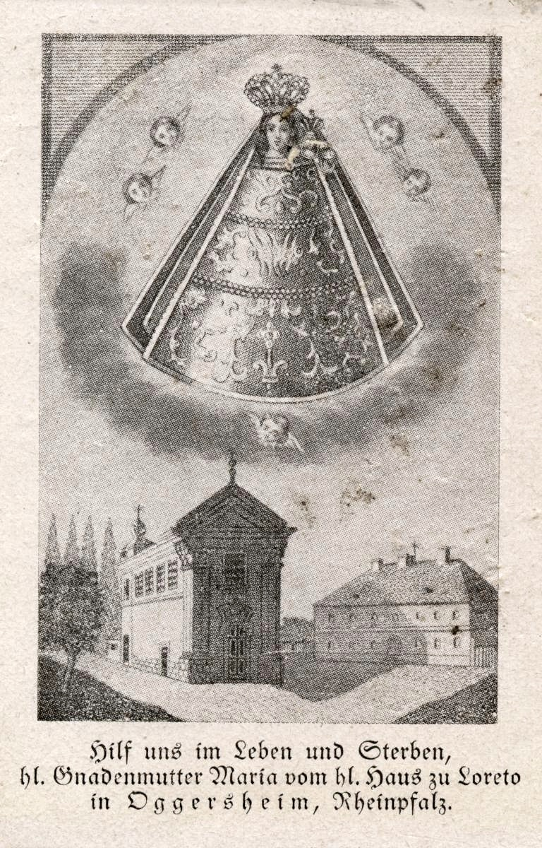 Andachtsbild Wallfahrt Oggersheim